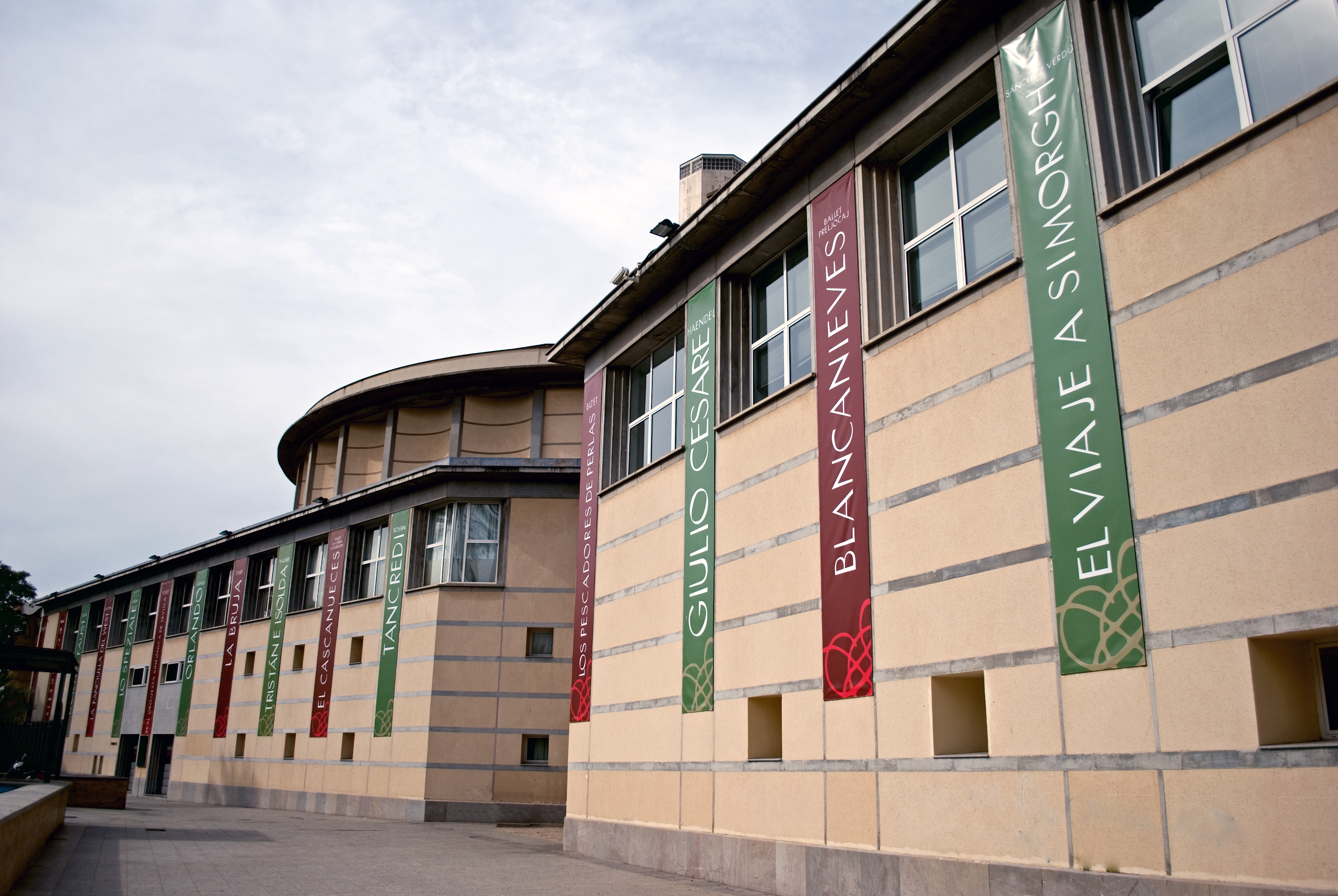 Teatro de la Maestranza de Sevilla (vista lateral desde los jardines de la Caridad)